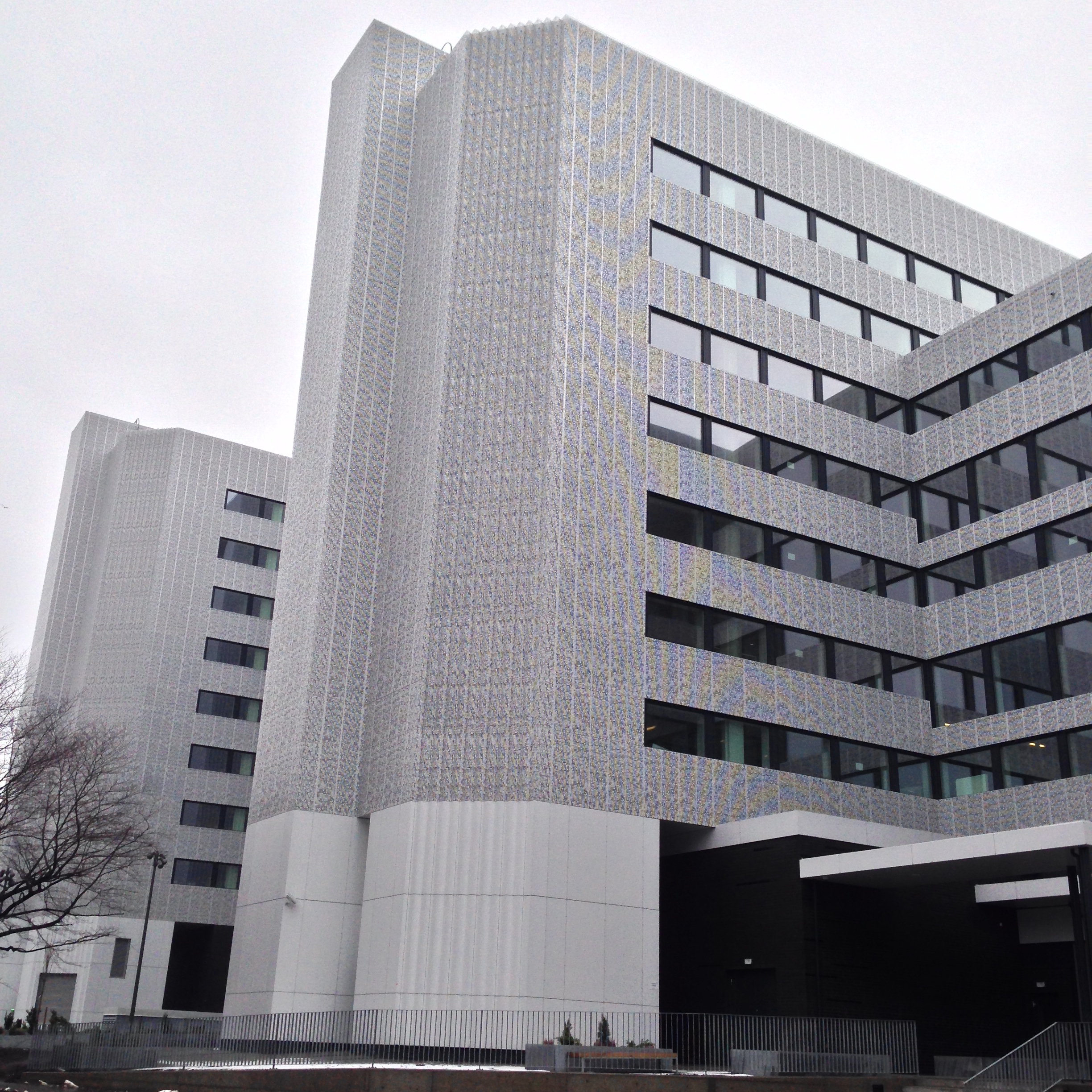 Skatteetatens lokaler i Fredrik Selmers vei 4, på Helsfyr i Oslo, etter renoveringen i 2011-2012.